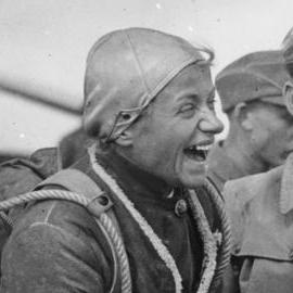 Scherl Bilderdienst Deutschlands Segelflieger auf der Rhön. Reichsluftsportführer Oberst Mahnke stattete gestern, den 27.8.36, den Segelfliegern auf der Wasserkuppe einen Besuch ab. Hier begrüßt er die bekannte Segelfliegerin Hanna Reitsch, die einzige weibliche Teilnehmerin des Wettbewerbs. 27.8.36 Bildber.: v.d.Becke 202-36 ADN/ZB-Archiv 12603-36 Hanna Reitsch beim Segelflug-Wettbewerb 1936 Bei der deutschen Segelflug-Wettbewerb 1936 auf der Wasserkuppe in der Rhön war Hanna Reitsch (l.) die einzige weibliche Teilnehmerin. Hier wird sie vom "Reichsluftsportführer" Oberst Mahnke (r.) begrüßt. (27.8.36 - v.d. Becke)